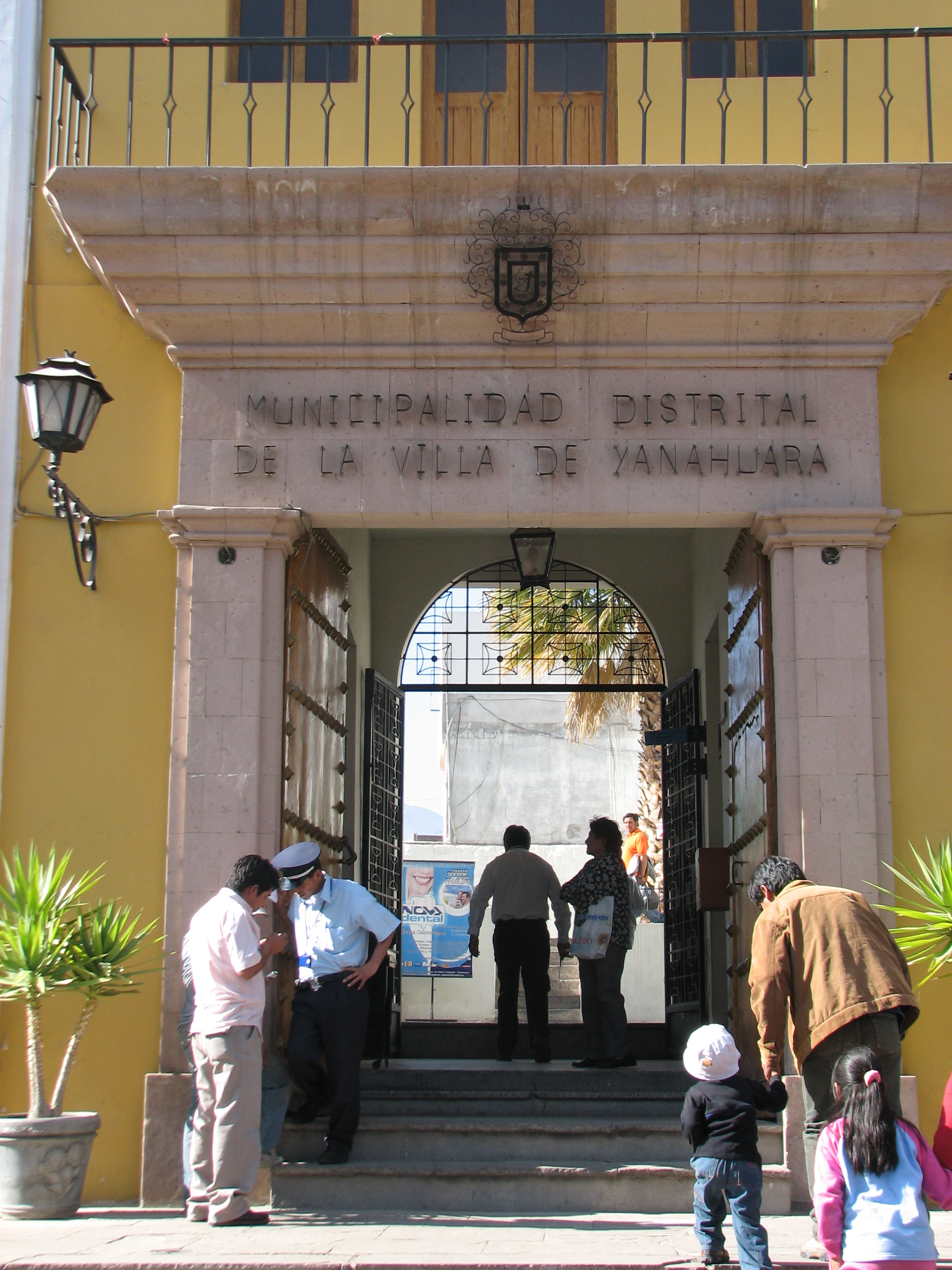 Municipalidad de Yanahuara in yanahuara/Arequipa/Arequipa in Peru.